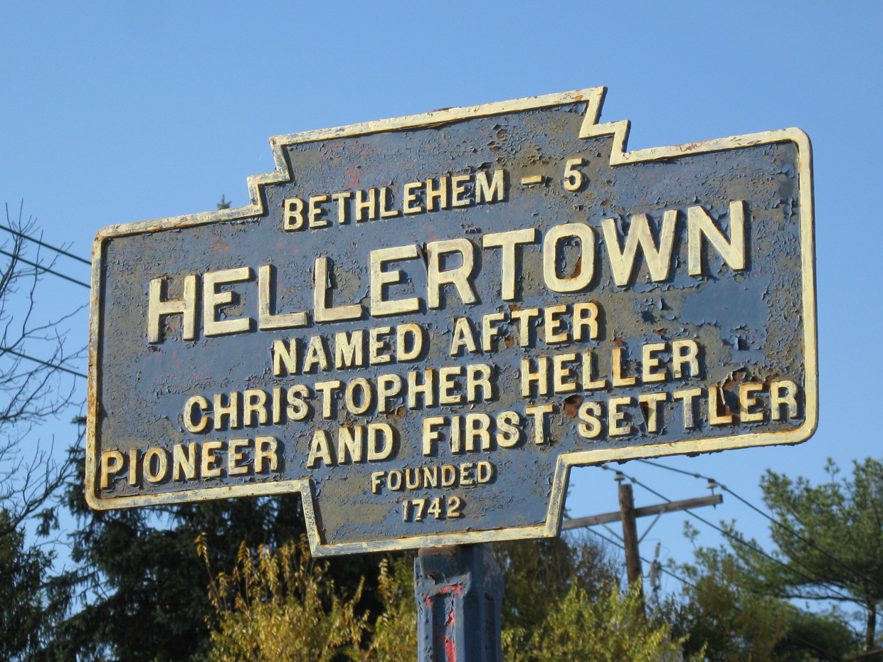 Keystone Marker for Hellertown, Pennsylvania